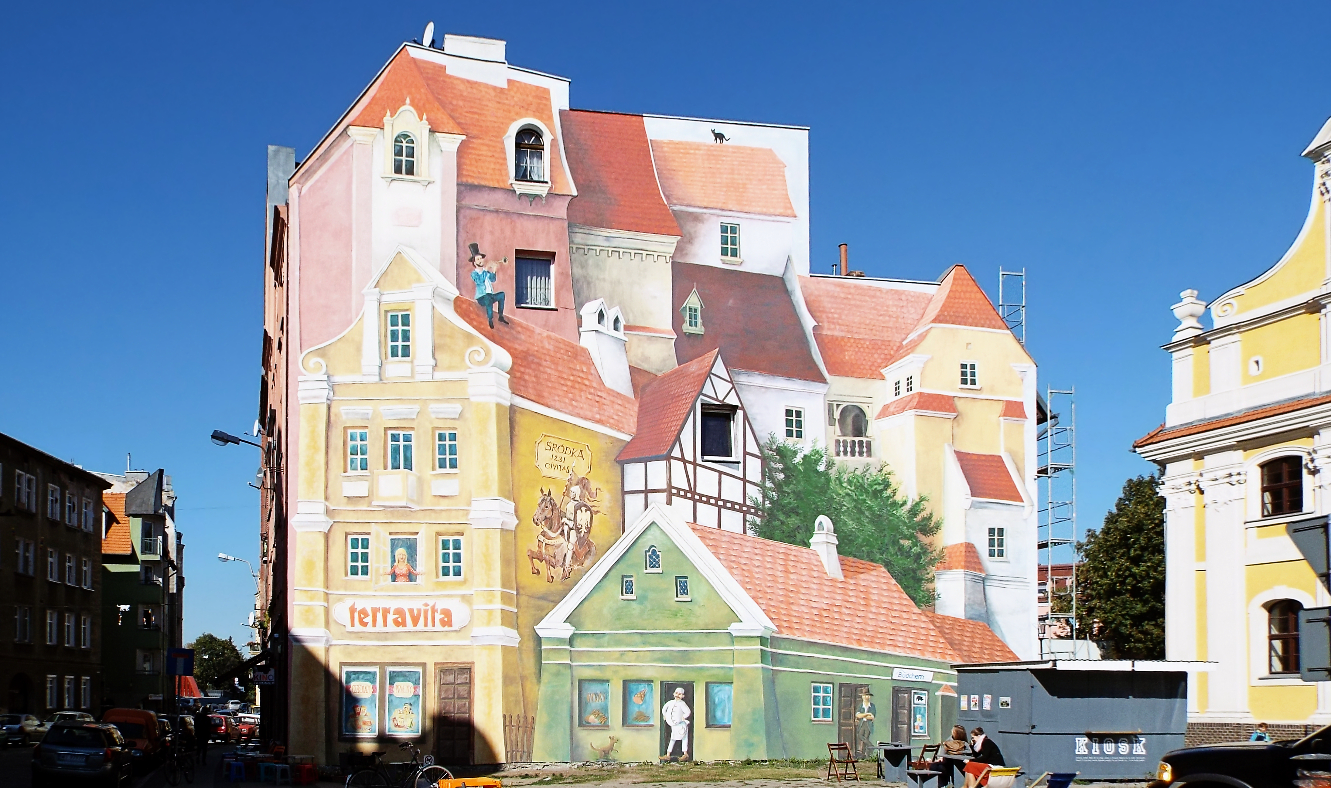 Mural "Opowieść śródecka z trębaczem na dachu i kotem w tle" na poznańskiej Śródce (ul. Śródka 3/Rynek Śródecki)